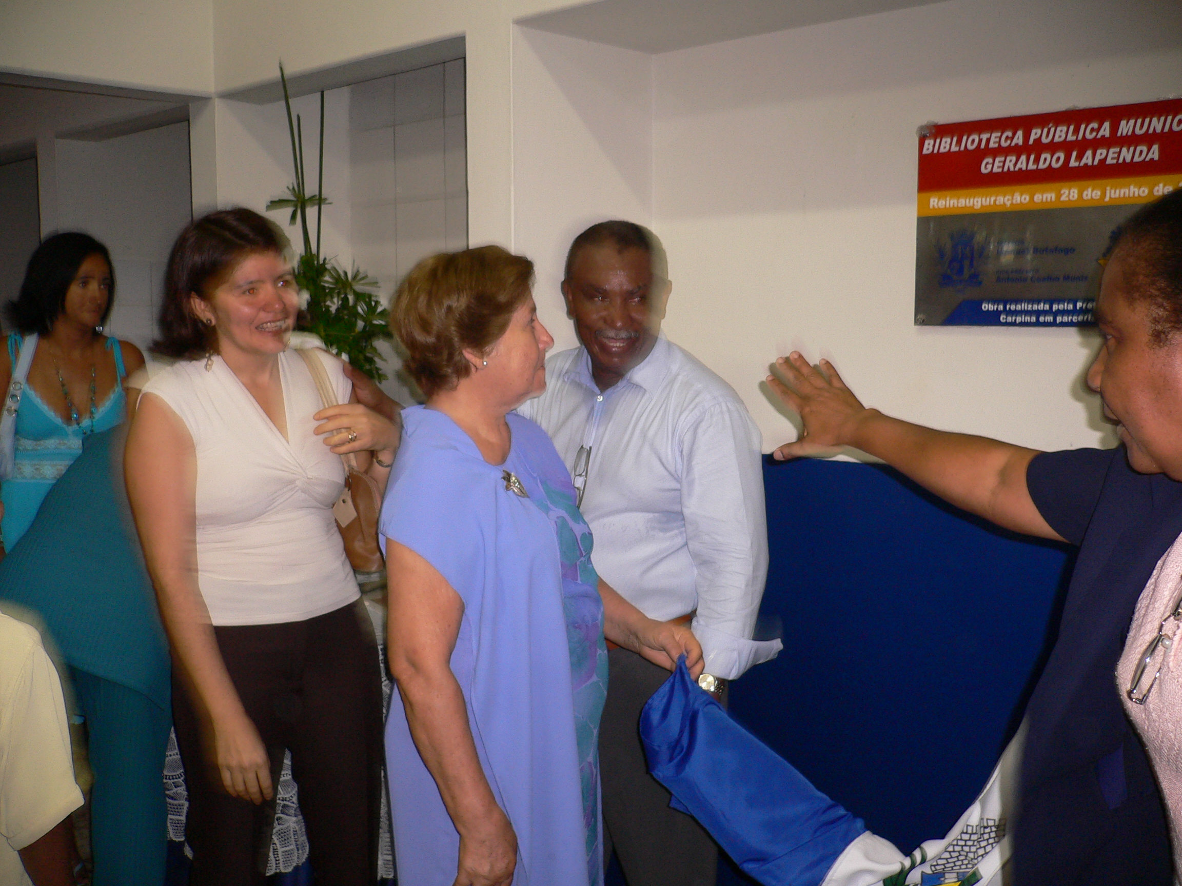 Descerramento da placa alusiva à inauguração da biblioteca pública municipal Geraldo Lapenda